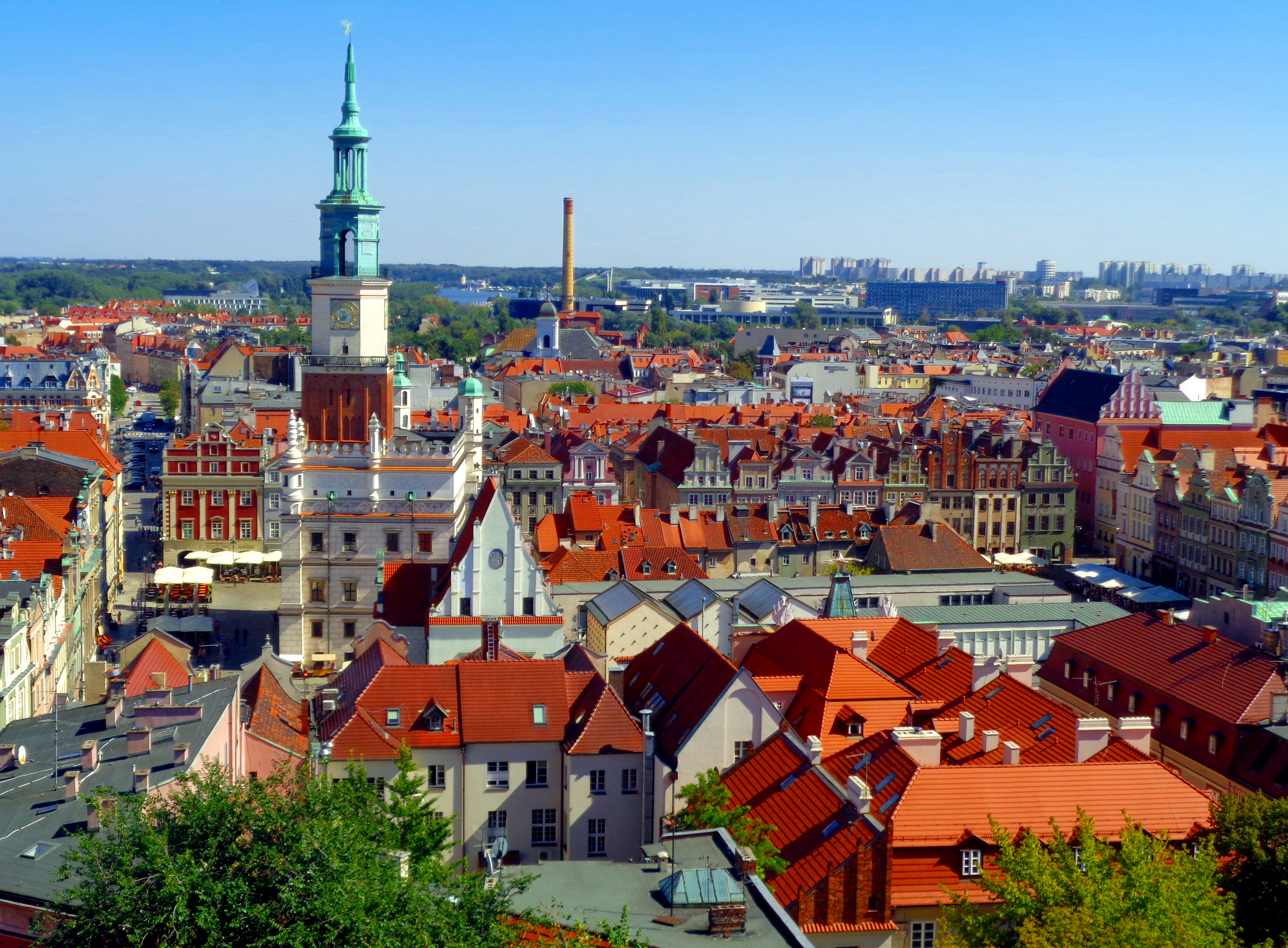 Poznań, zespół urbanistyczno-architektoniczny Starego Rynku